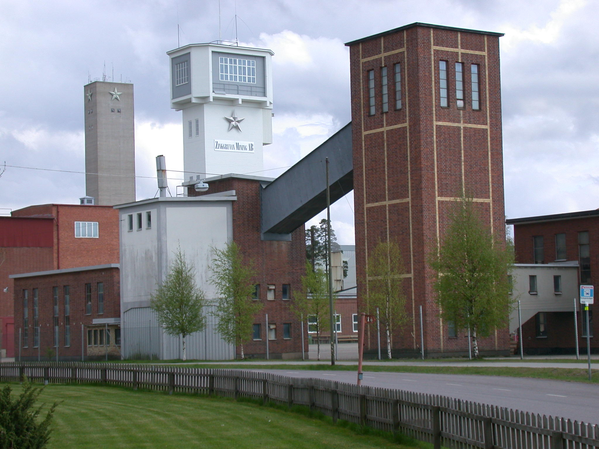 Zinkgruvan zinc mine, Sweden. Photo by Riggwelter, May 20, 2006.